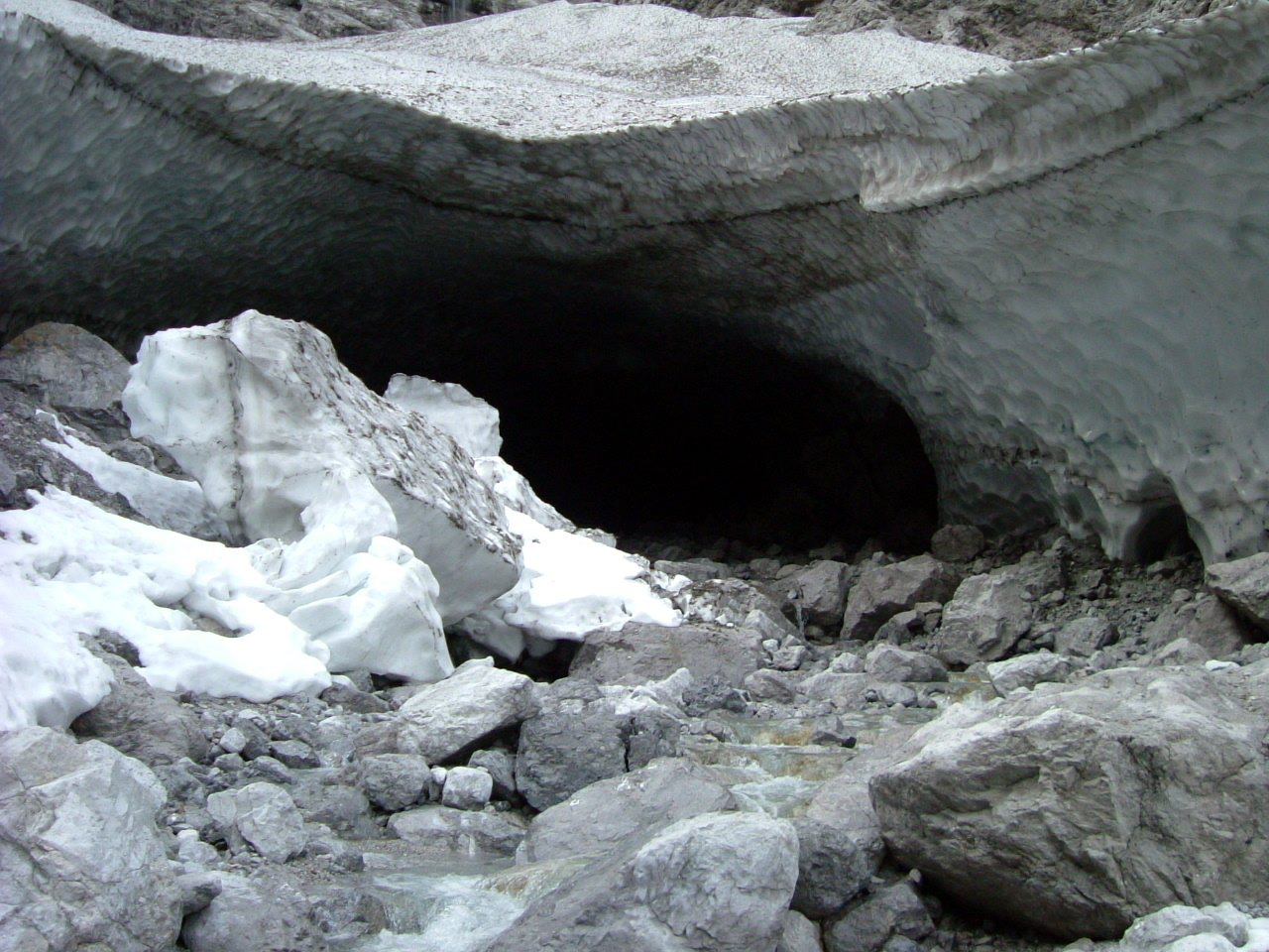 Nationalpark Berchtesgaden: "Gletschertor" des Schneefeldes am Fuß der Ostwand des Watzmanns (sog. Eiskapelle)